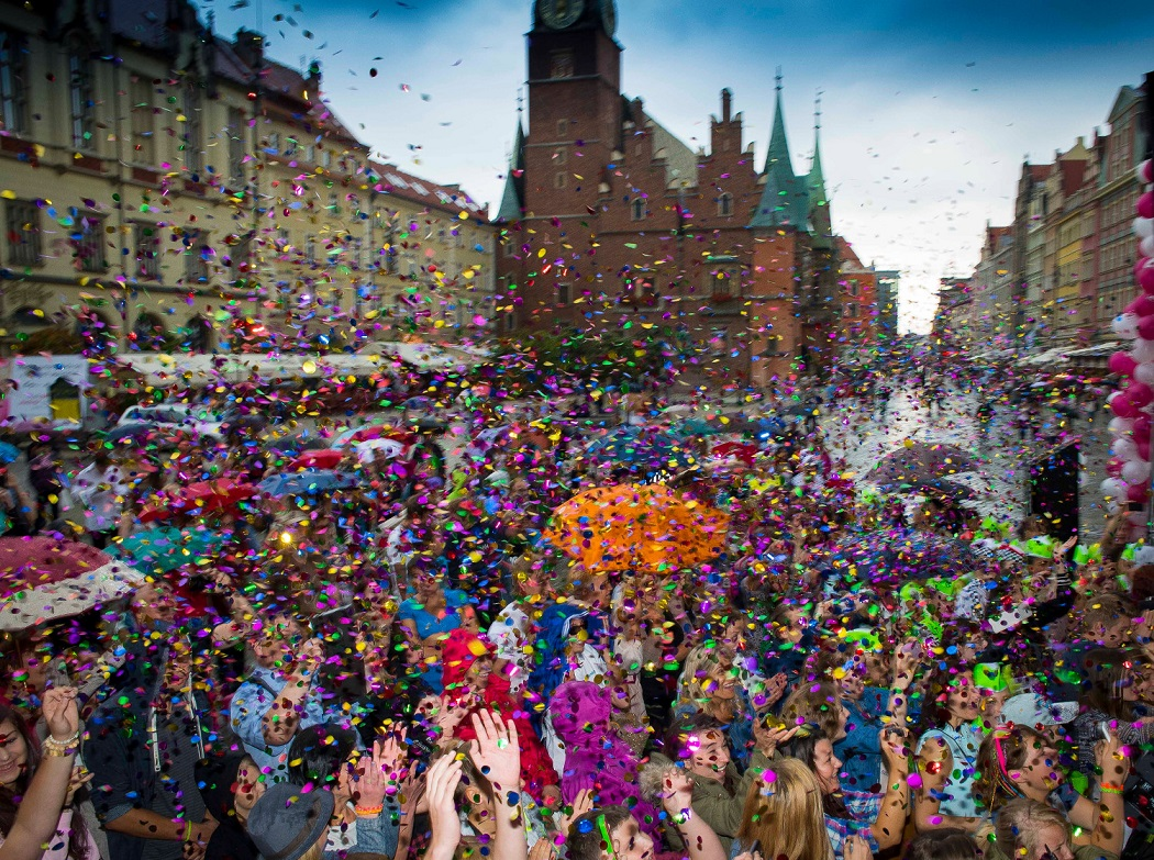 Fundacja "Na ratunek dzieciom z chorobą nowotworową". Rynek, Wrocław.